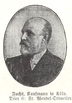 Eduard Fuchs (1844-1923), deutscher Reichstagsabgeordneter (Zentrum)